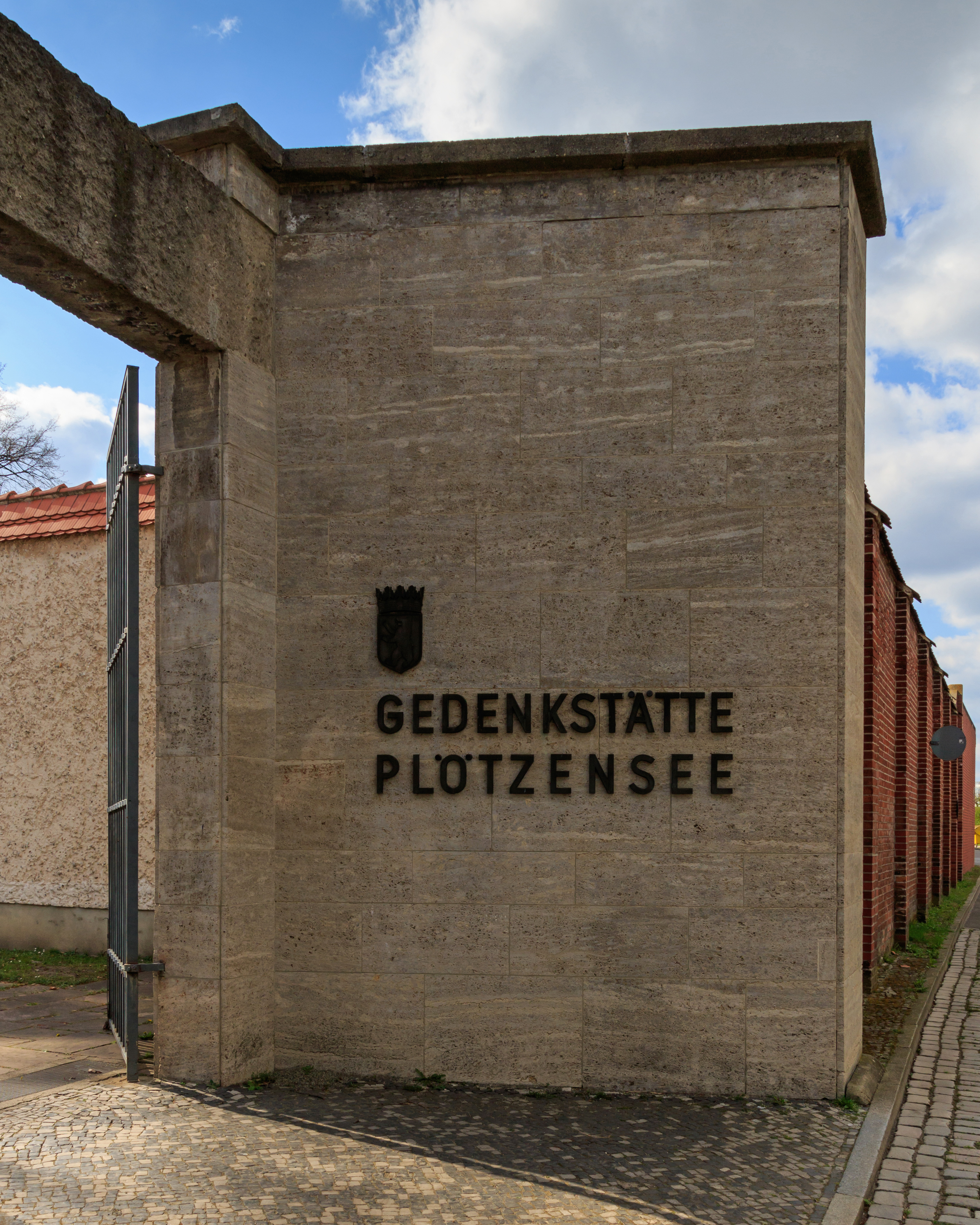 Gedenkstätte Plötzensee: Schriftzug am Eingangstor